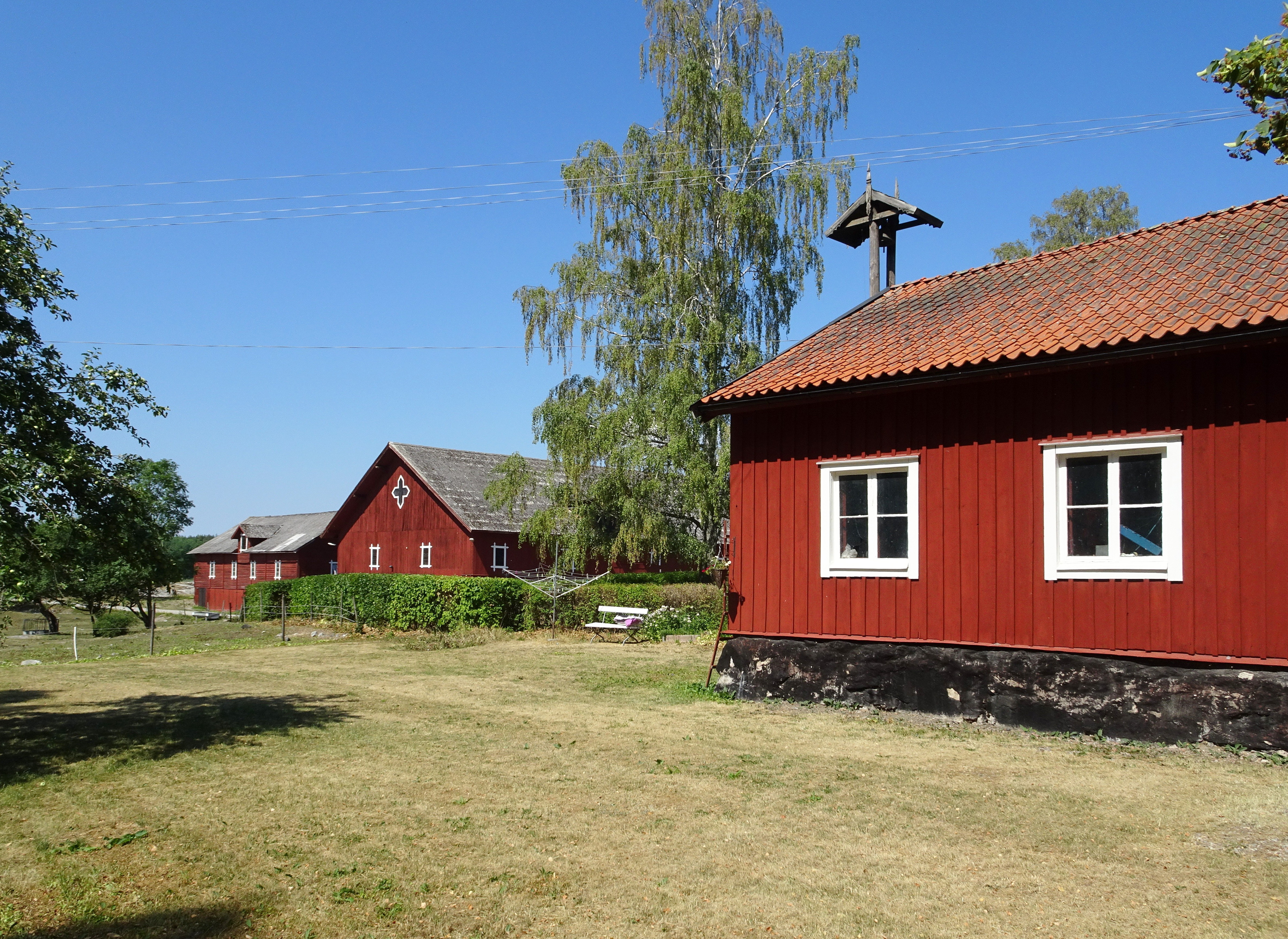 Kungsbergs gård, Fogdö socken